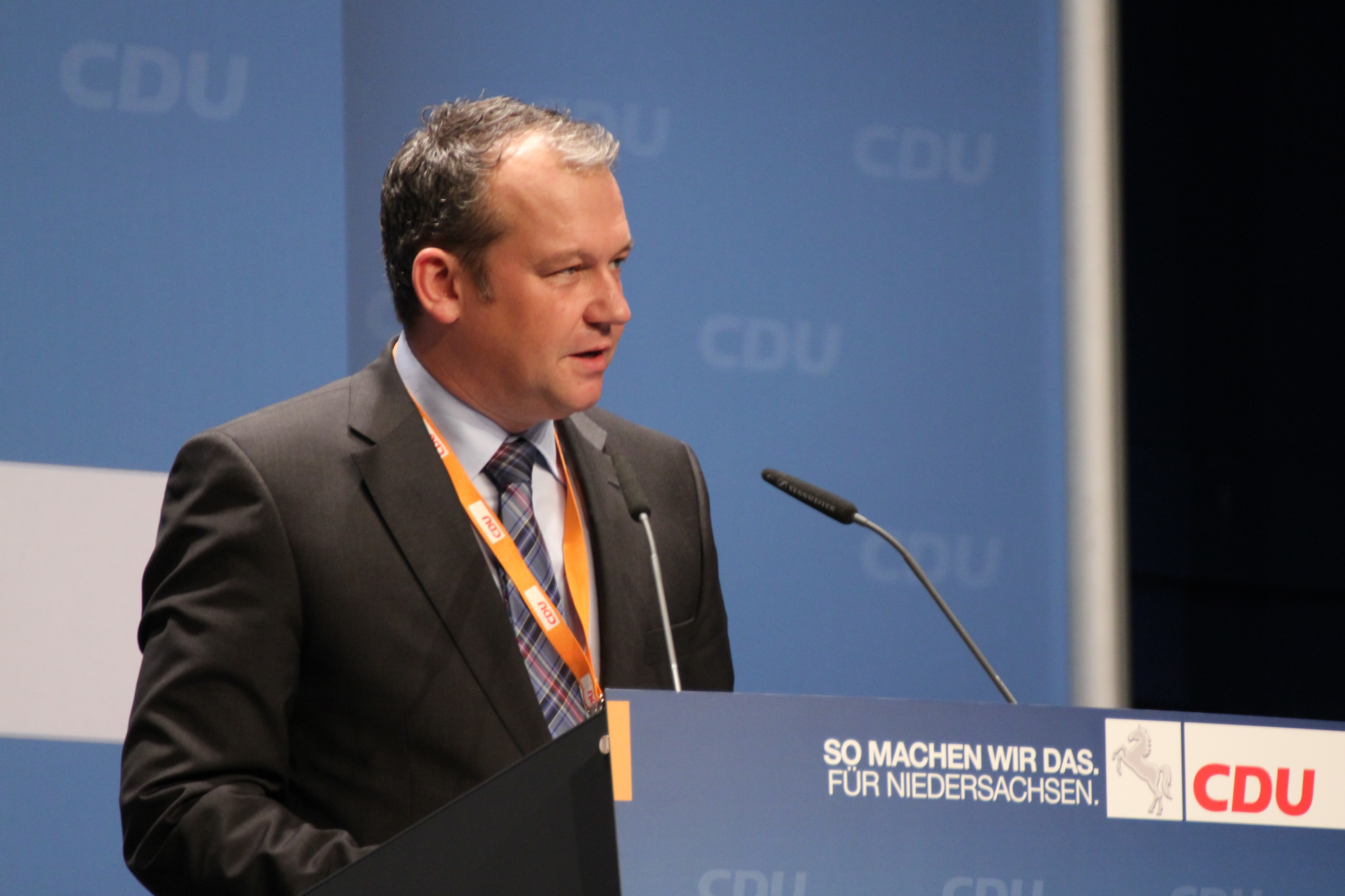 Andreas Wagner (* 1968), deutscher Kommunalpolitiker (CDU), Oberbürgermeister von Wilhelmshaven.